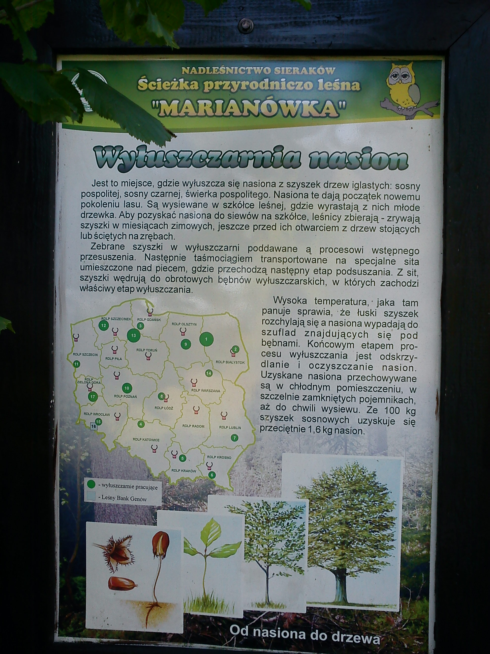 Tablica informacyjna ścieżki "Marianówka"